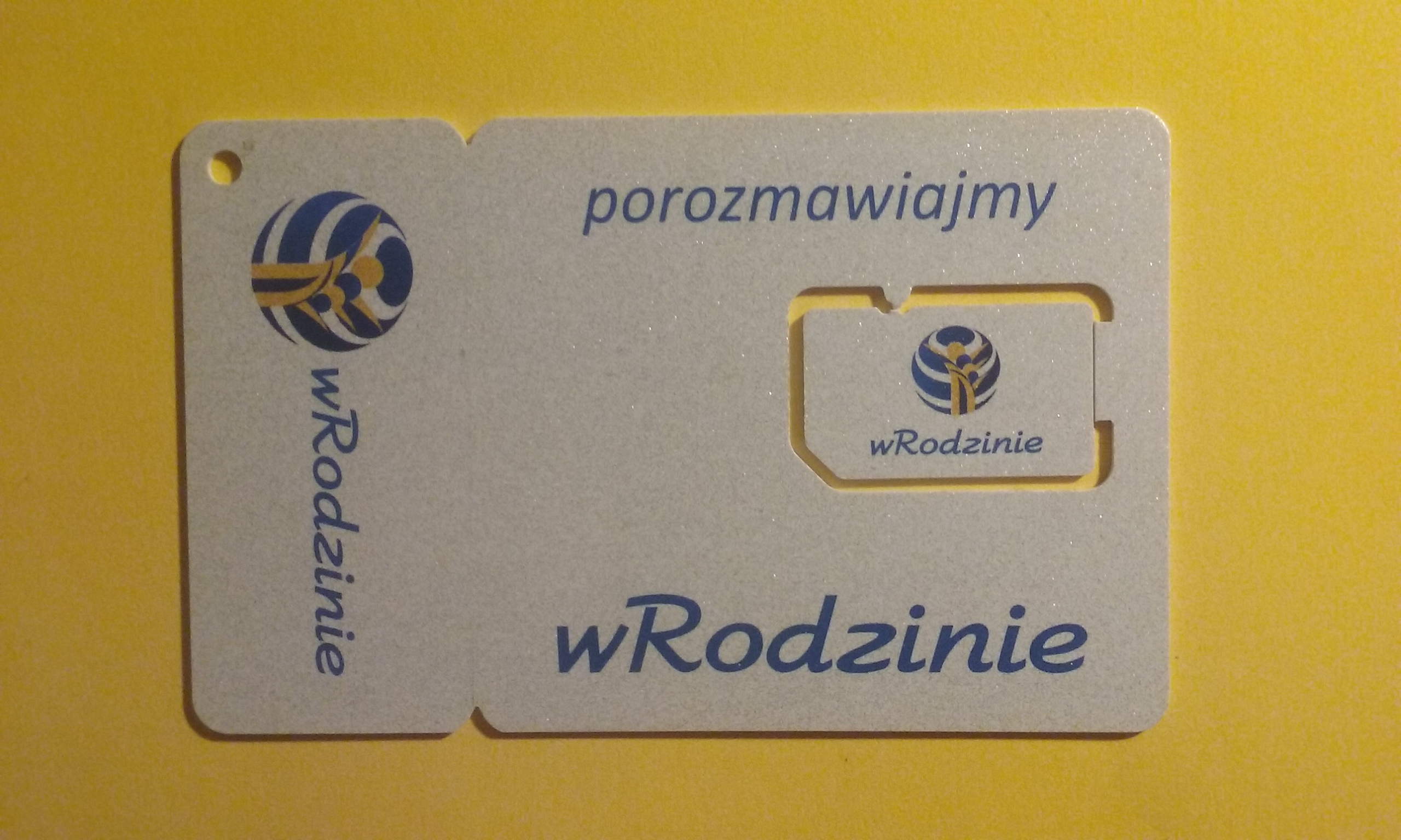 Karta SIM polskiej sieci telefonii komorkowej wRodzinie działajacej na infrastrukturze Plusa